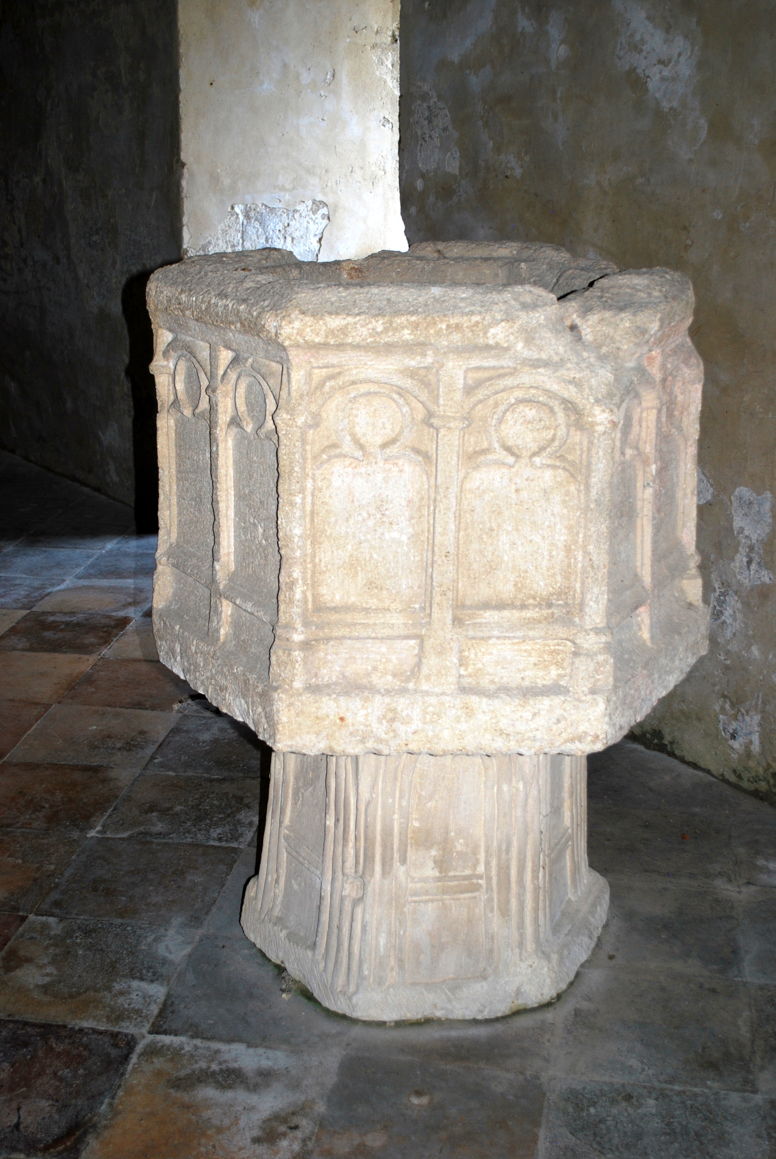 Bellefond église St Eutrope